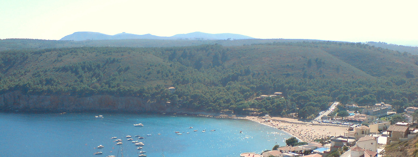 Blick in die Montgobucht